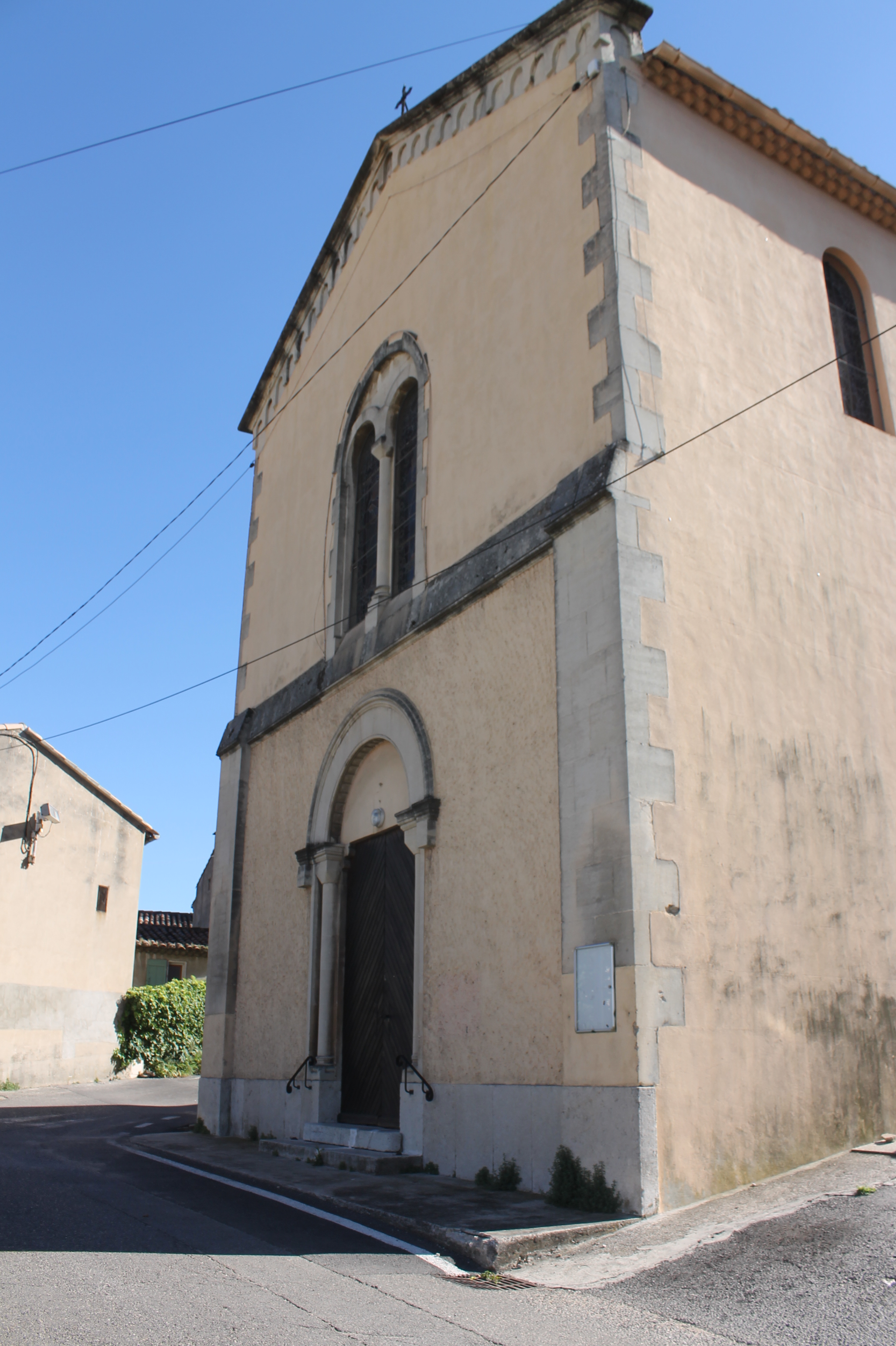 Église paroissiale de la Destrousse 13